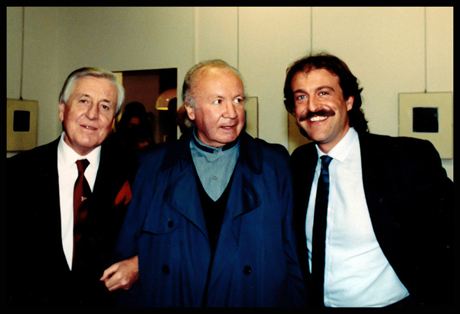 Augusto De Luca, Mario De Biasi e Lanfranco Colombo: mostra fotografica di Augusto De Luca alla galleria "Il Diaframma" di Milano (30 novembre 1987).